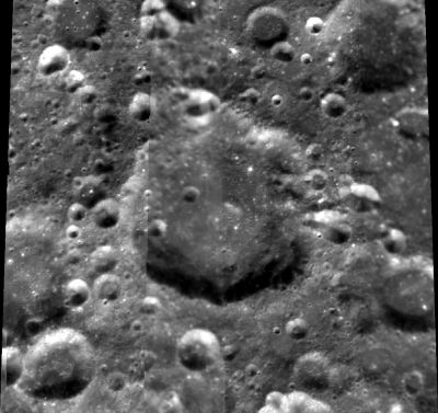 施内勒尔环形山